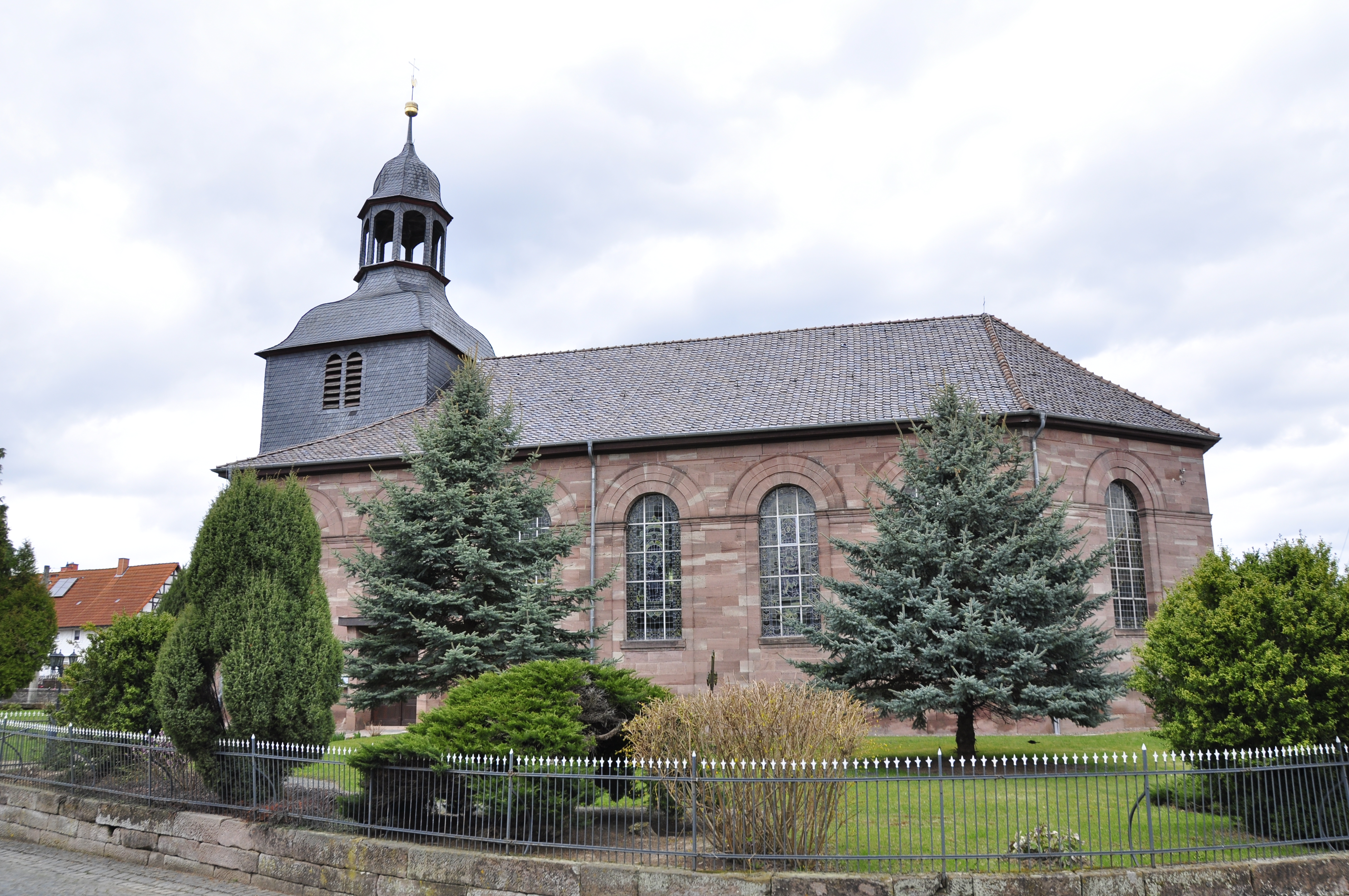 Thüringen